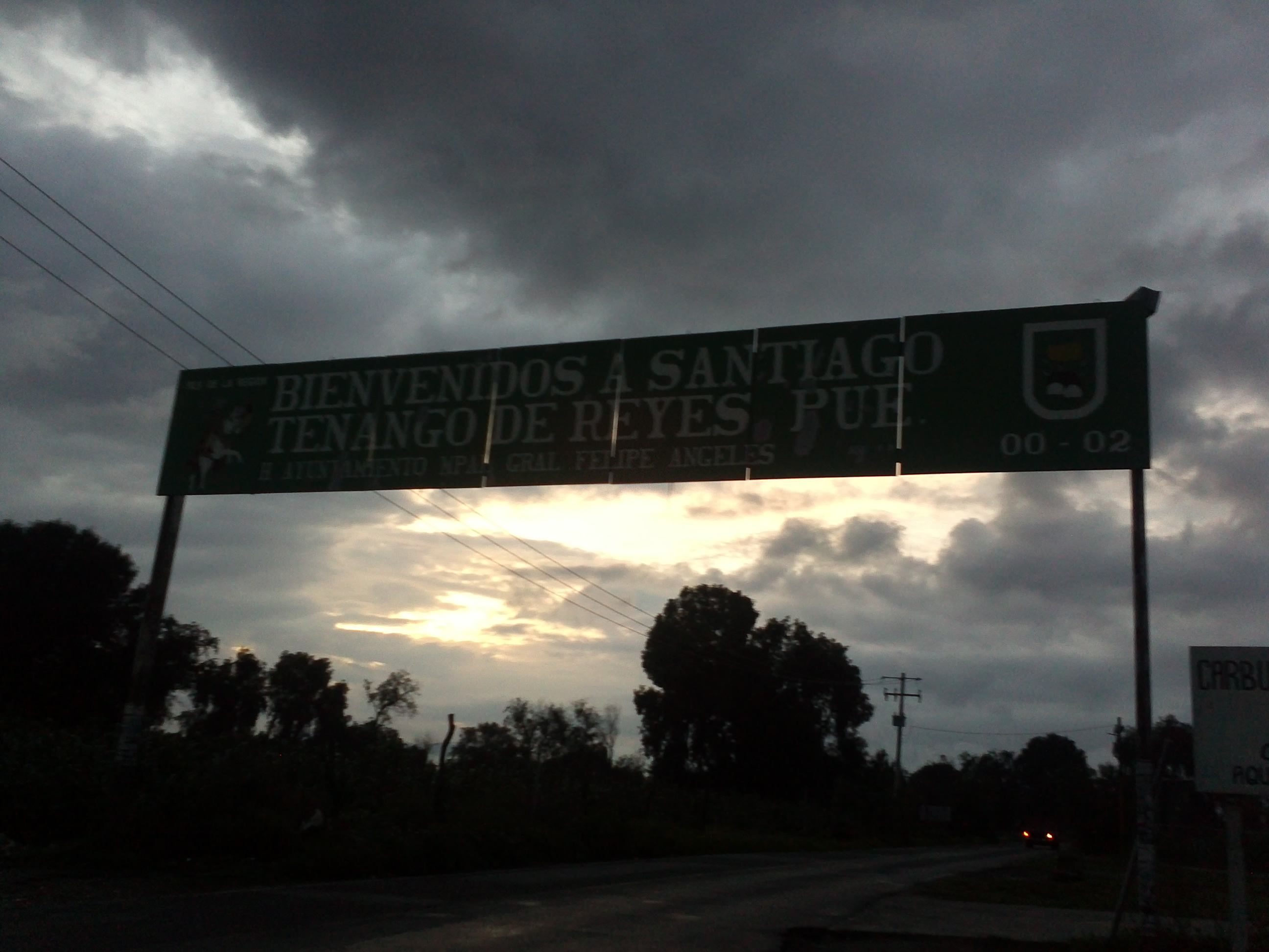 Entrada a Santiago Tenango, Mpio. de Felipe Angeles, Puebla, México